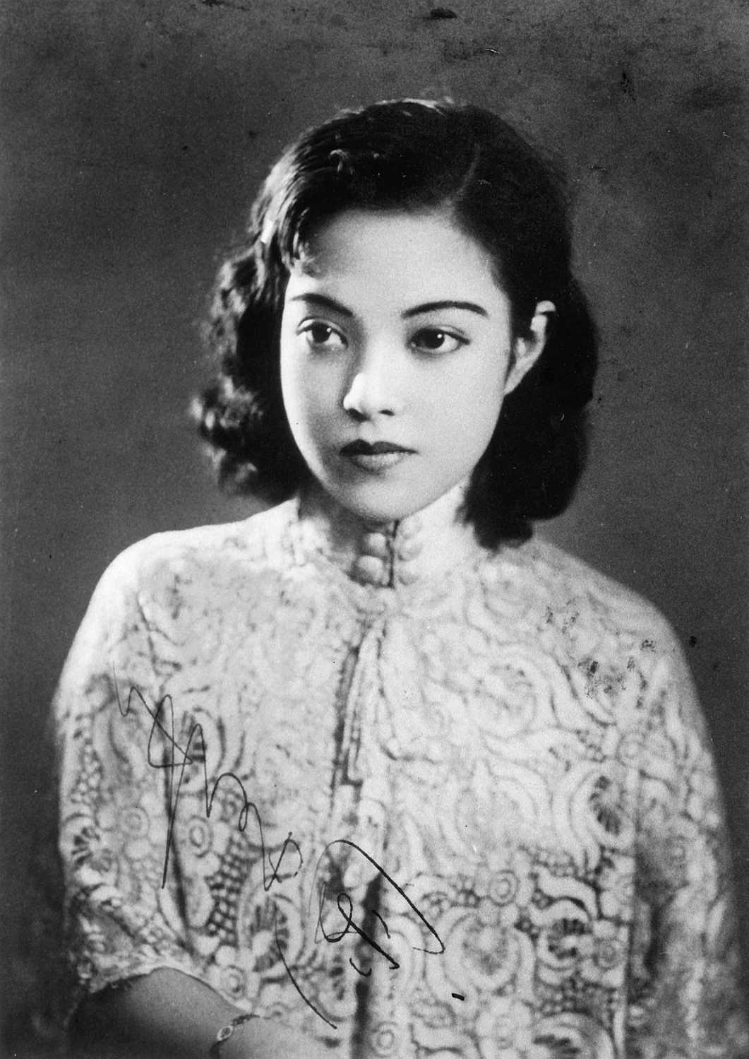 Актриса и певица Ли Сянлань в юности